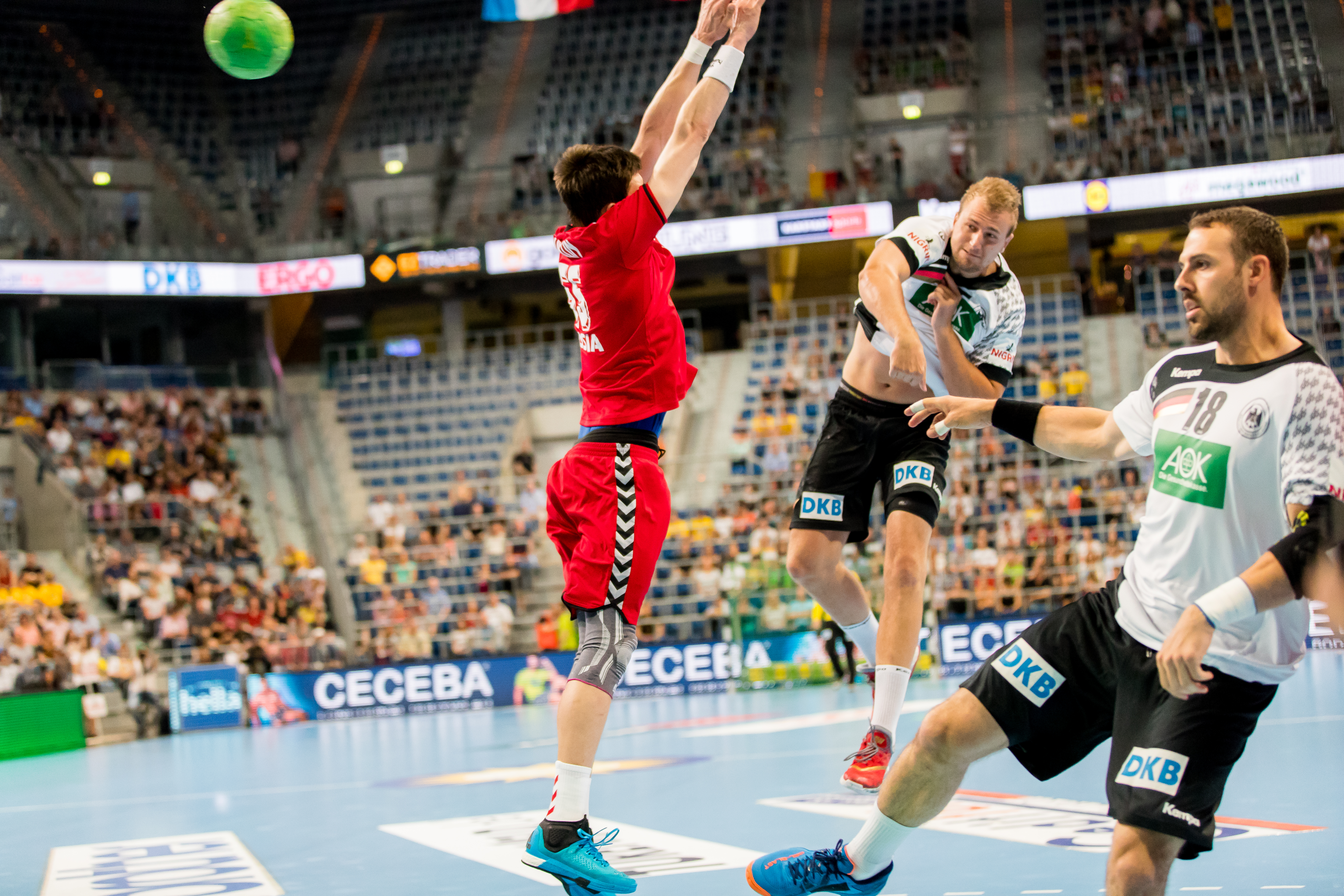 International Handball friendly match between Germany and Russia during Handball Deutschland vs Russland (25:27) at SAP Arena, Mannheim, Baden Württemberg, Germany on 2016-06-08, Photo: Sven Mandel